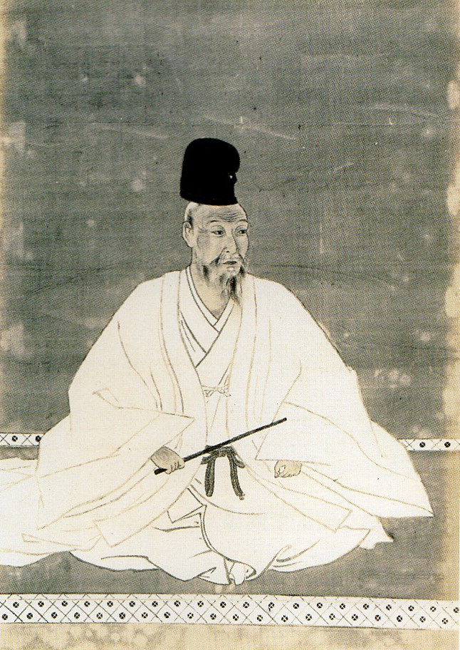 半家吉田家九代当主・吉田兼見の肖像画(昭和14年撮影)。